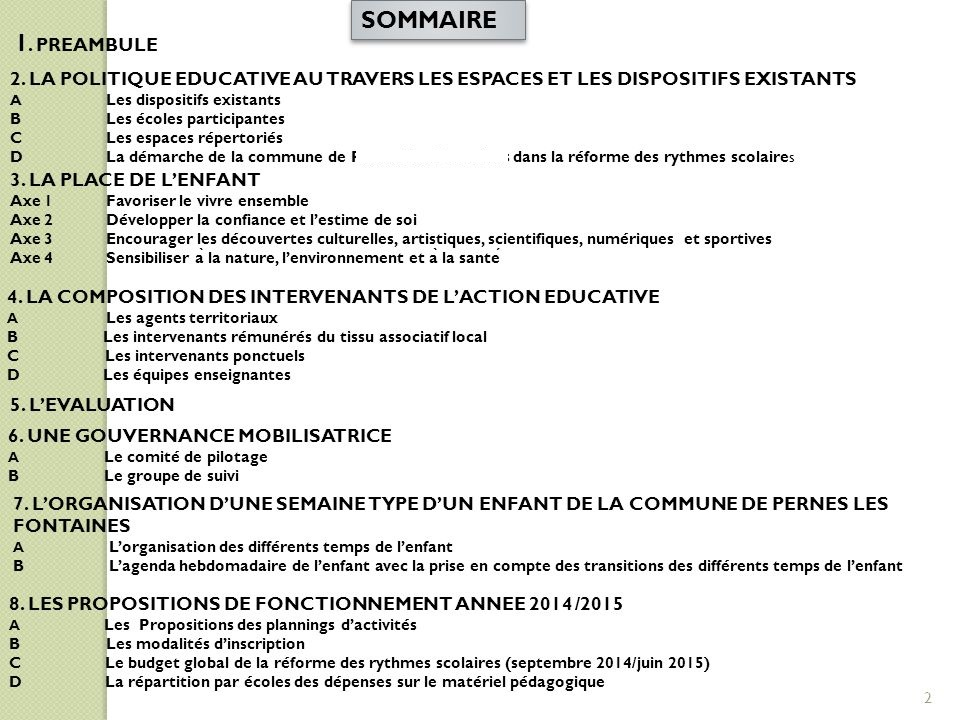 Projet pédagogique rédiger par un directeur diplômé du BPJEPS Loisirs tous publics (LTP) sur un ACM